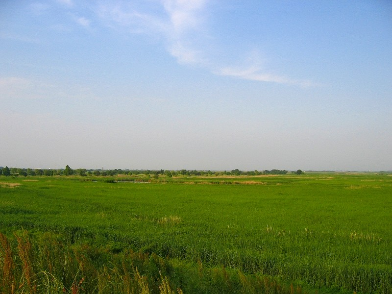 渡良瀬遊水地